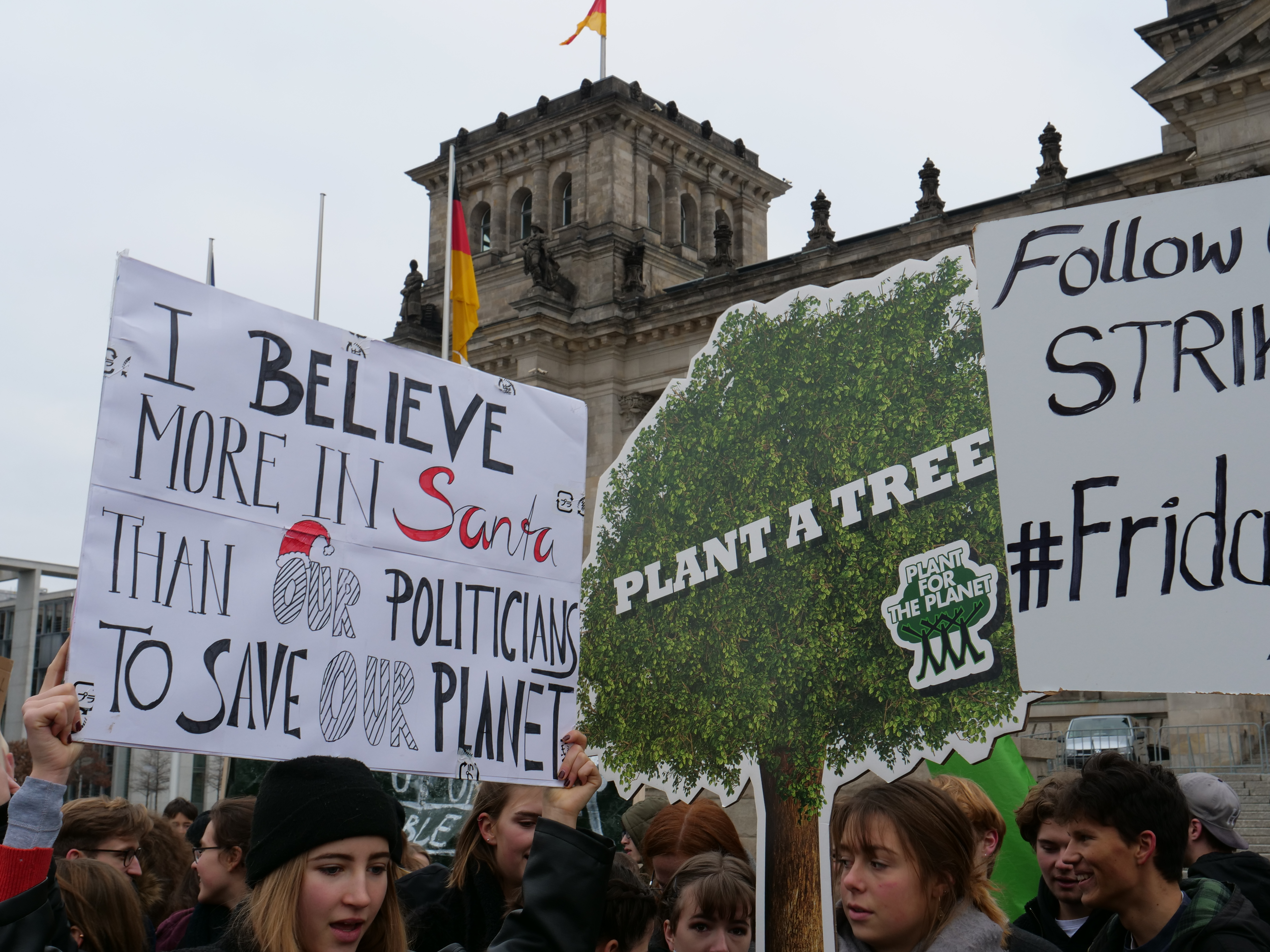 Unter dem Motto "#FridaysForFuture" und "Climate Strike!" streikten insbesondere Schülerinnen und Schüler vor dem Reichstagsgebäude in Berlin.